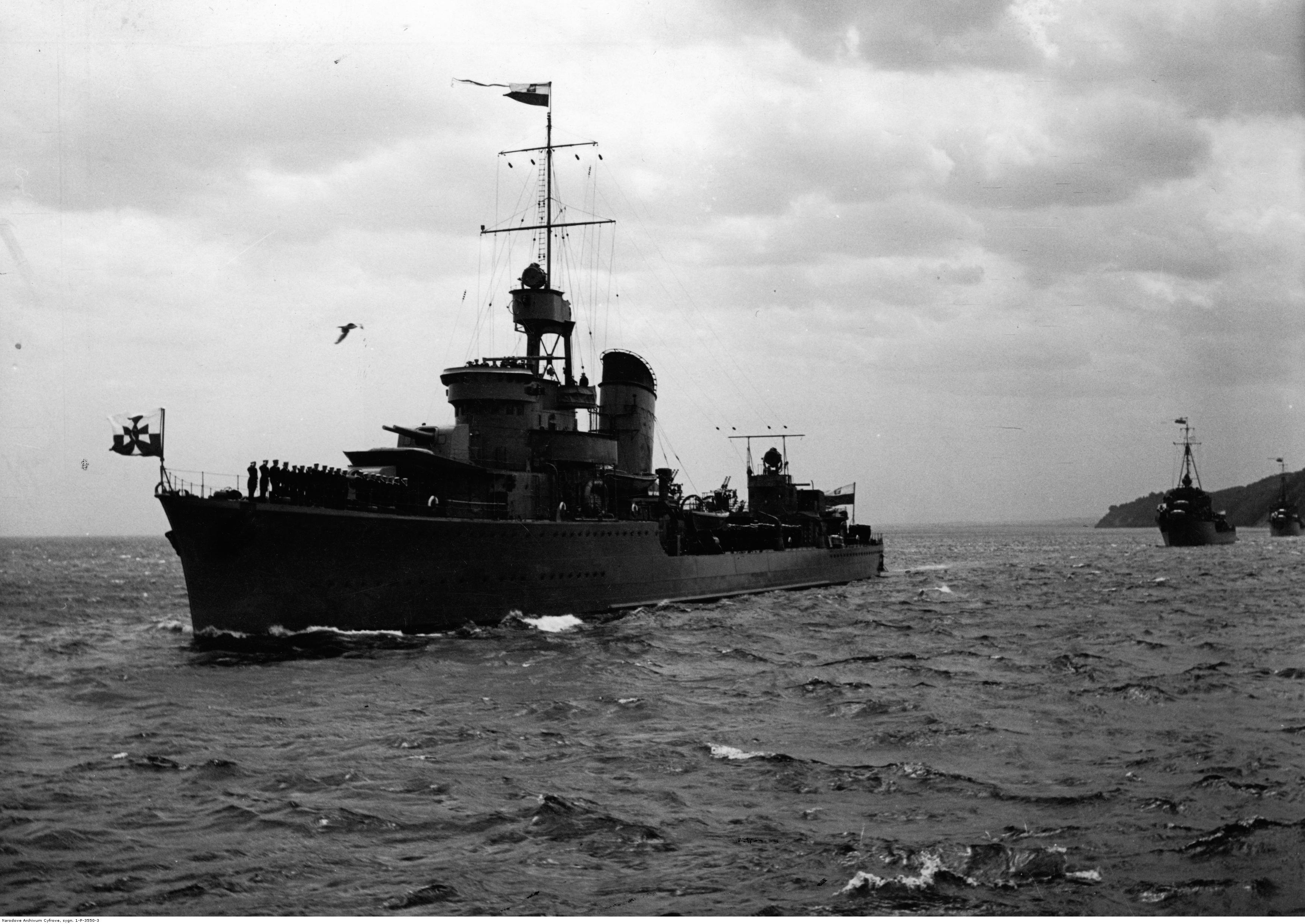 Obchody Święta Morza w Gdyni - ORP "Błyskawica"